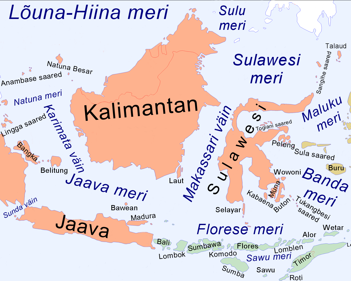 Kalimantan